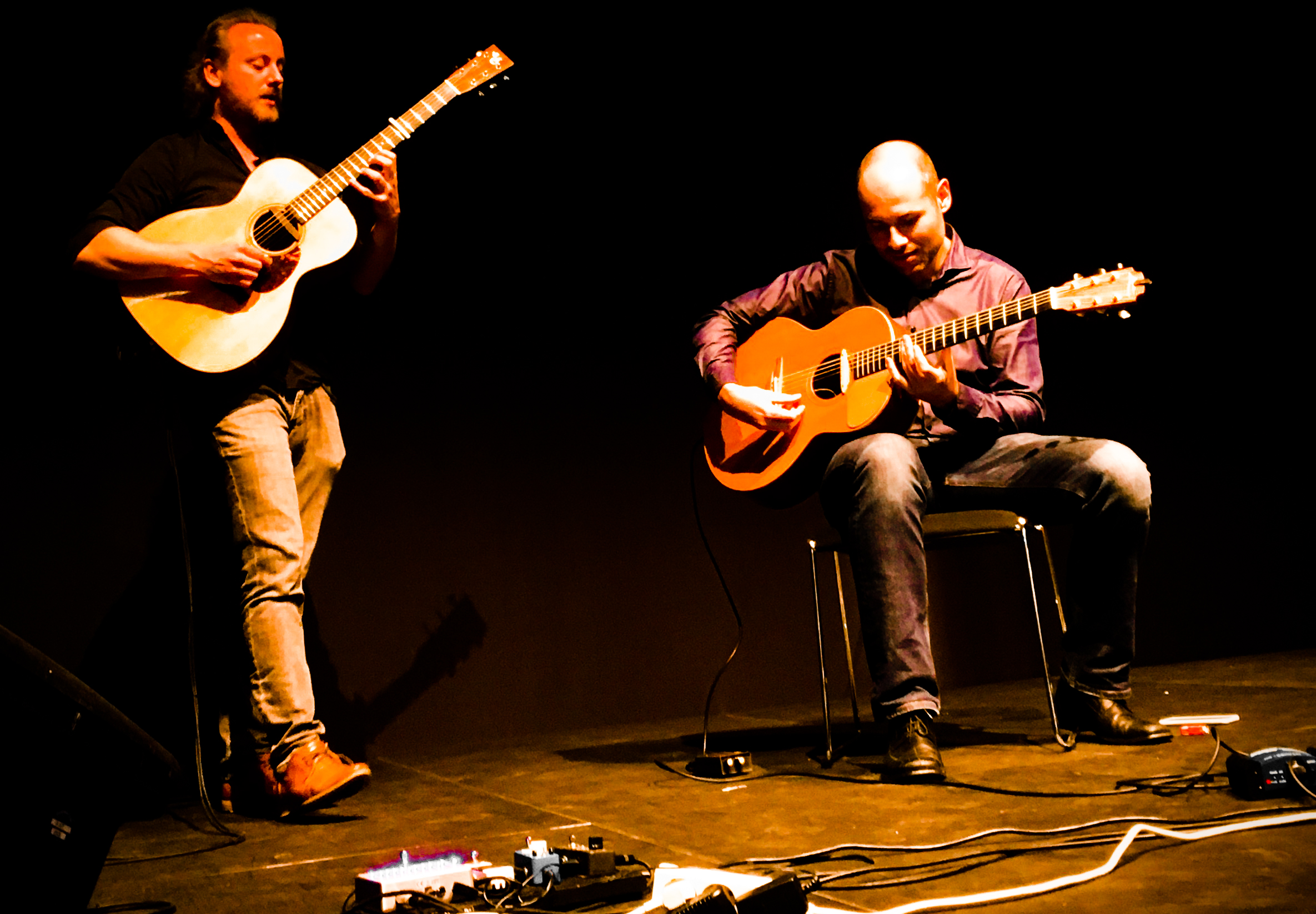 Vienna Fingerstyle Gründer Markus Schlesinger und Wilfried Lepuschitz 2019